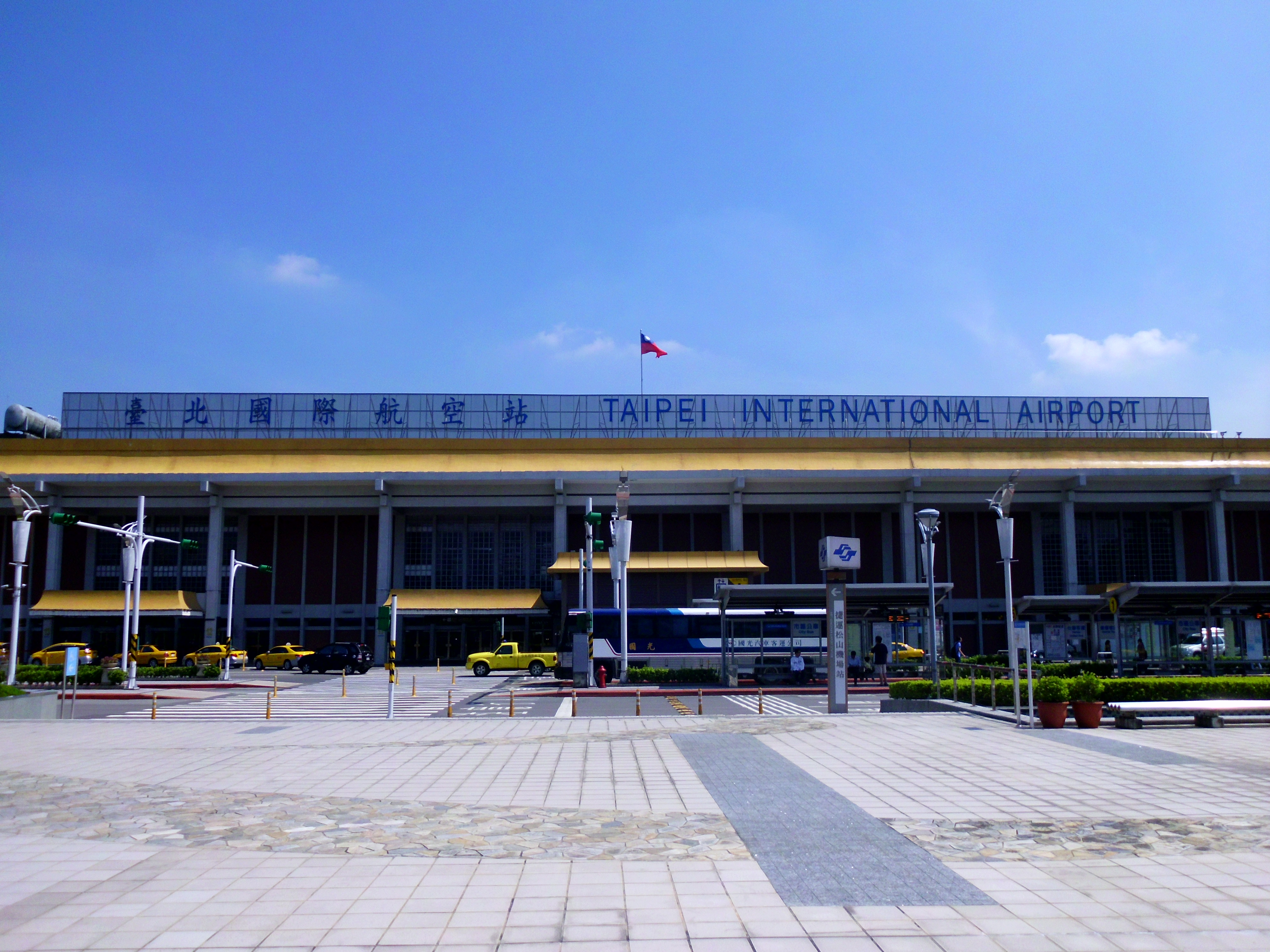 中文（台灣）: 台北松山機場。